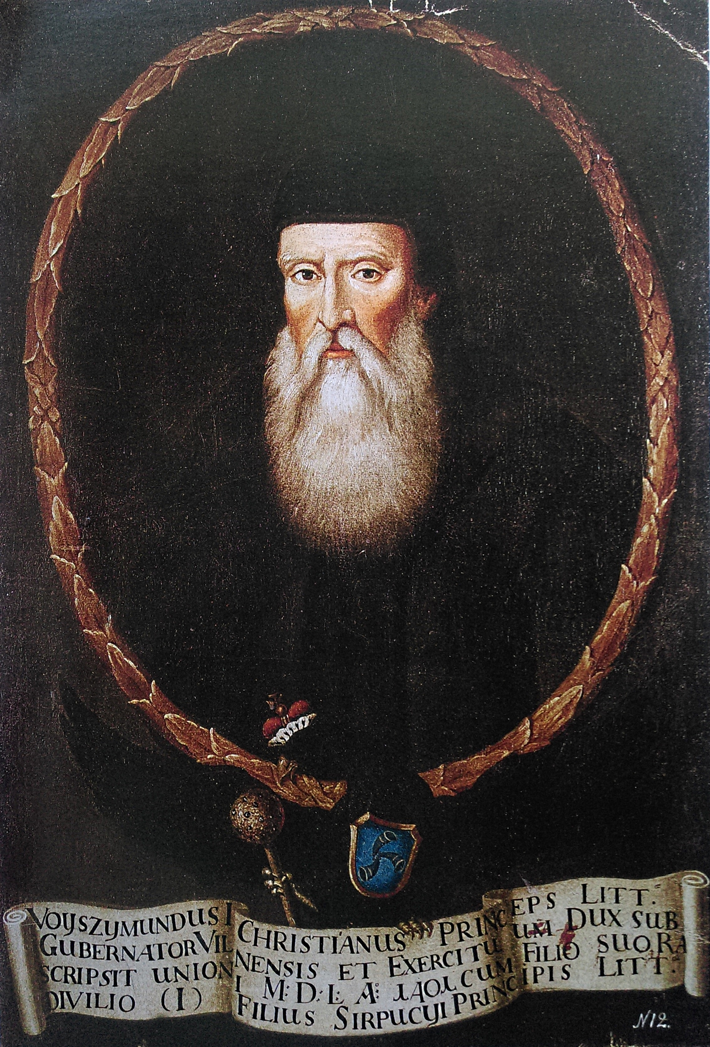 Невядомы мастак. Партрэт Вайшунда. 2-я пал. XVII - 1- я пал. XVIII стагоддзя. Нацыянальны музей гісторыі і культуры Беларусі. Палатно, алей, 106.5 х 72 см. З калекцыі Радзівілаў у Нясвіжы (да 1941).Беларуская (тарашкевіца): Партрэт Вайшунда (Vajšund)